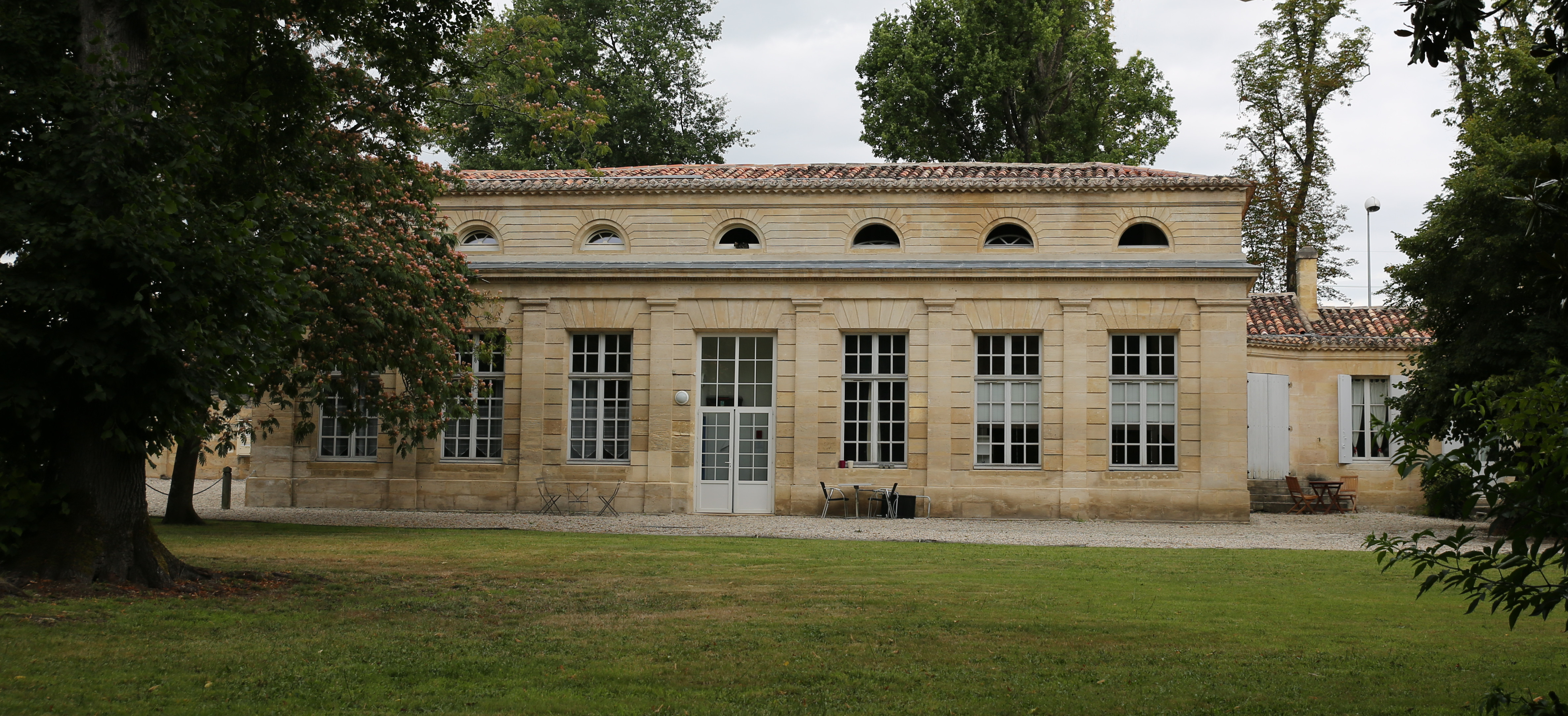 Demeure, l'orangerie